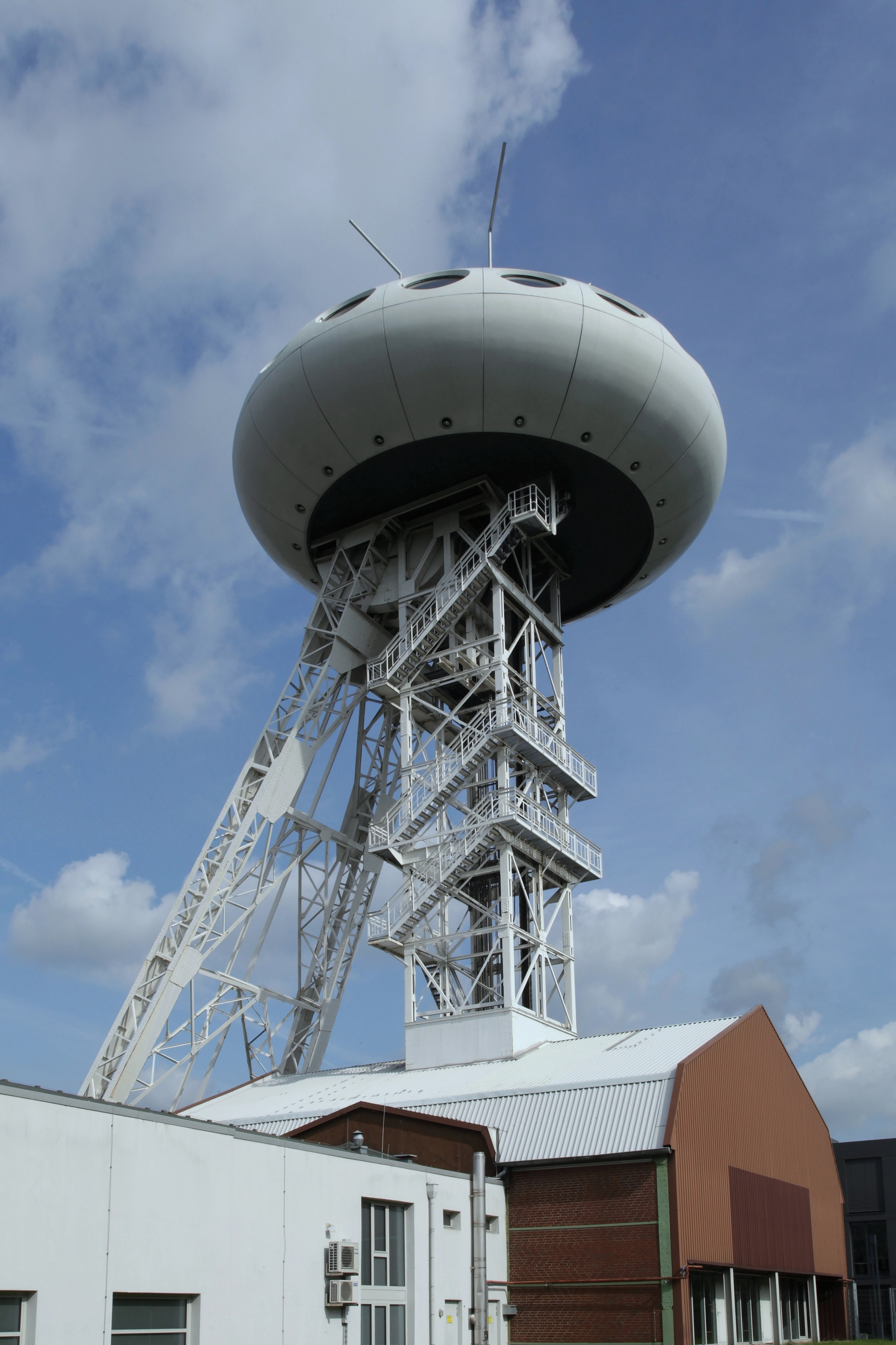 Lüntec-Tower, Förderturm mit Colani-Ei über Schacht 4 der Schachtanlage 4 von Zeche Minister Achenbach, Am Brambusch in Lünen